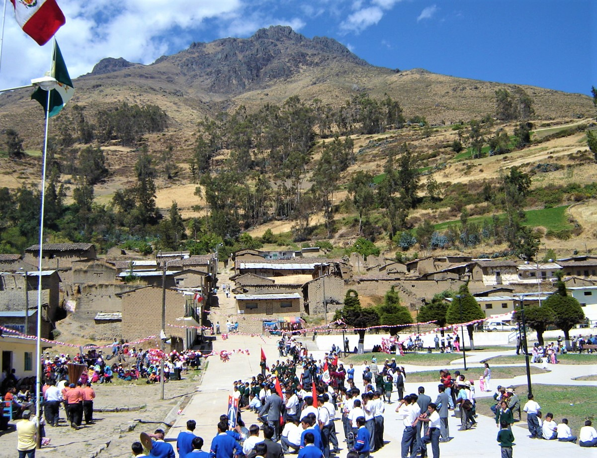 Plaza frente al Palacio Municipal del distrito de Succha, ubicado en la provincia de Aija y departamento de Áncash en el Perú.